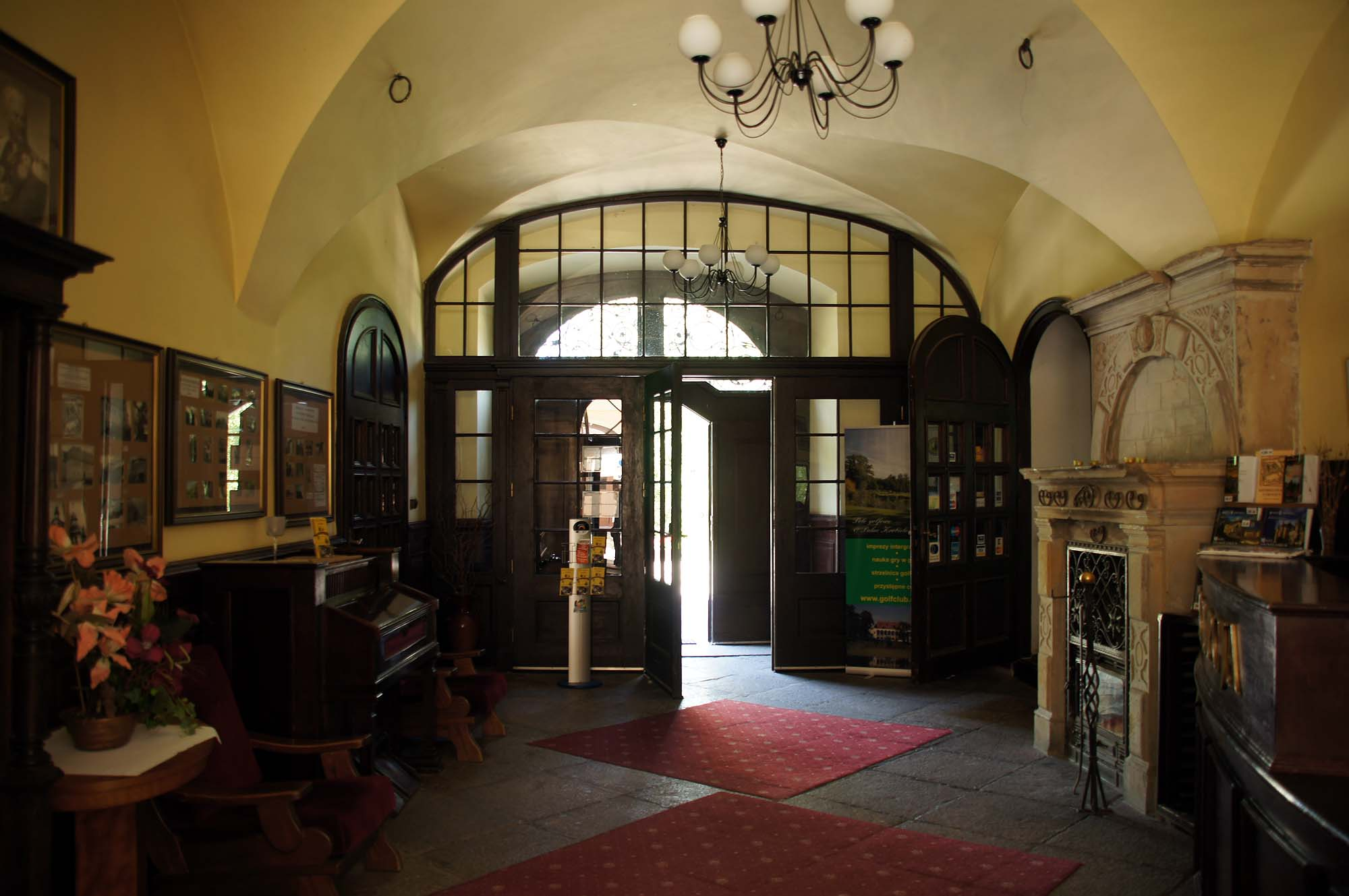 Krobielowice 21 - zamek, XVII, XIX